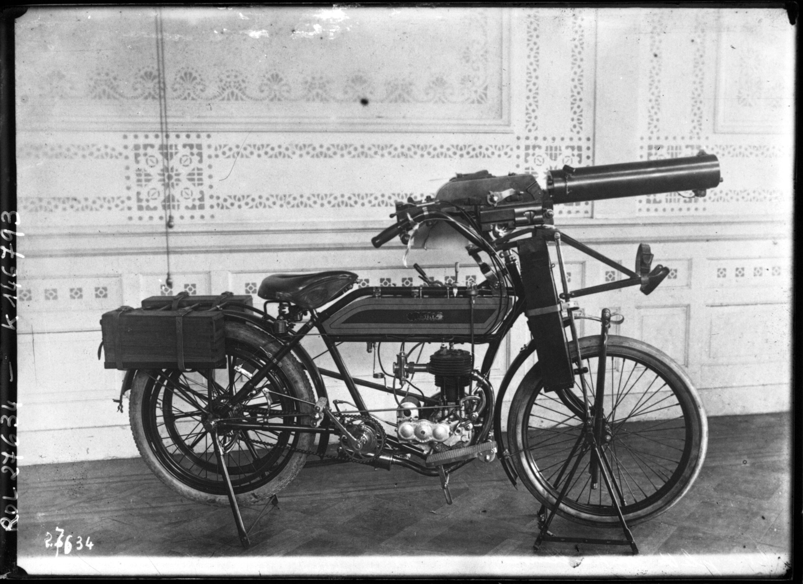 Motocyclette mitrailleuse